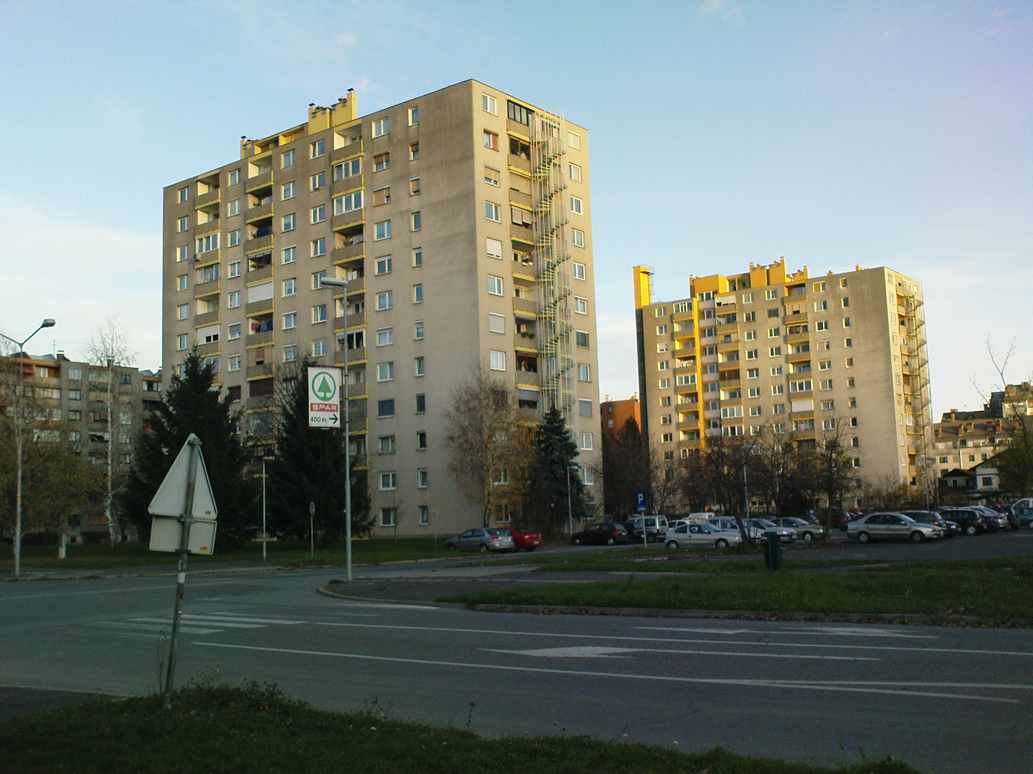 Stolpnici na Teznem